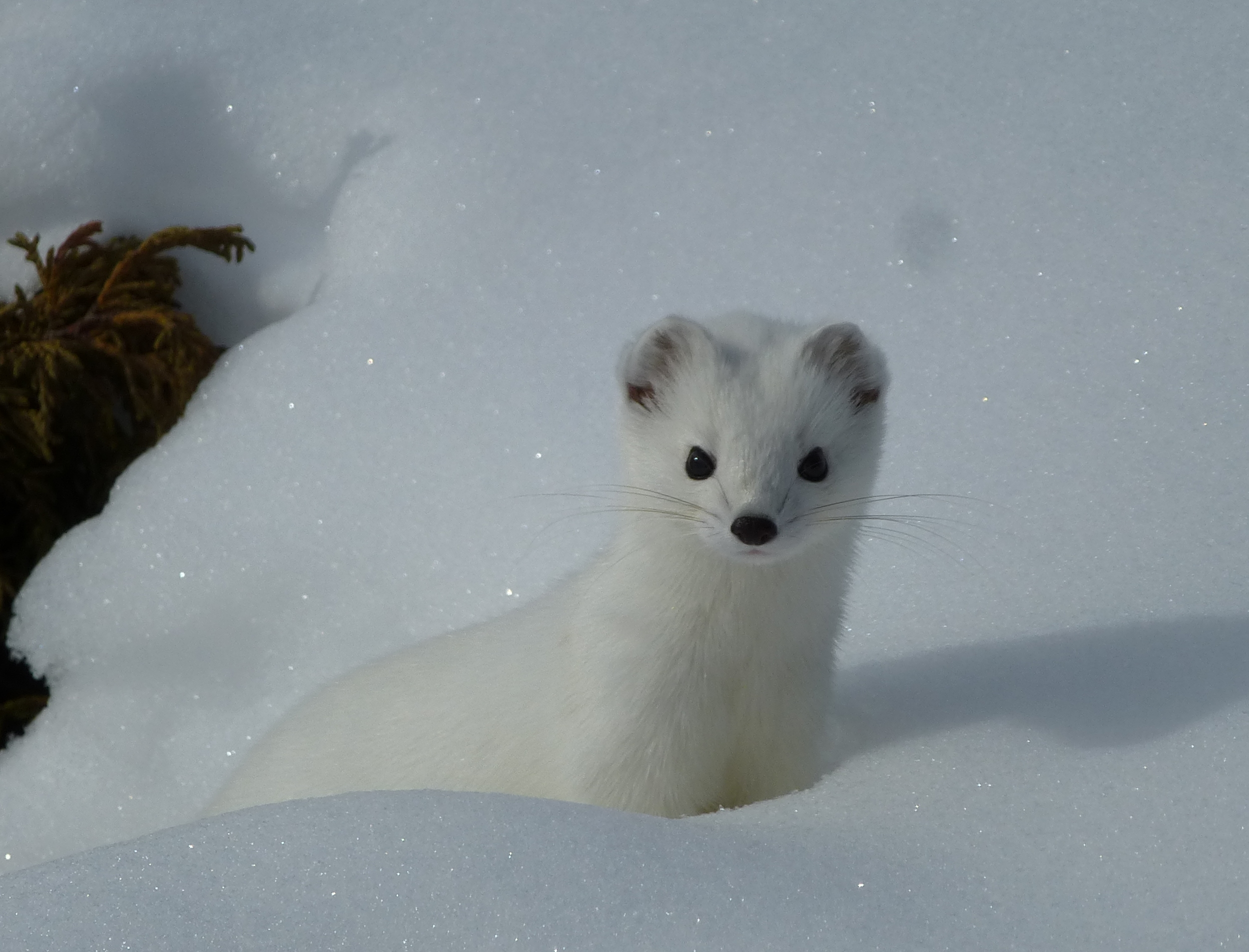 Горностай выглядывает из снега. Снято в Заилийском Алатау.